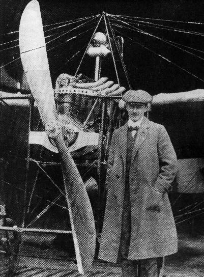 Jan Kaspar, first Czech aircraft designer.